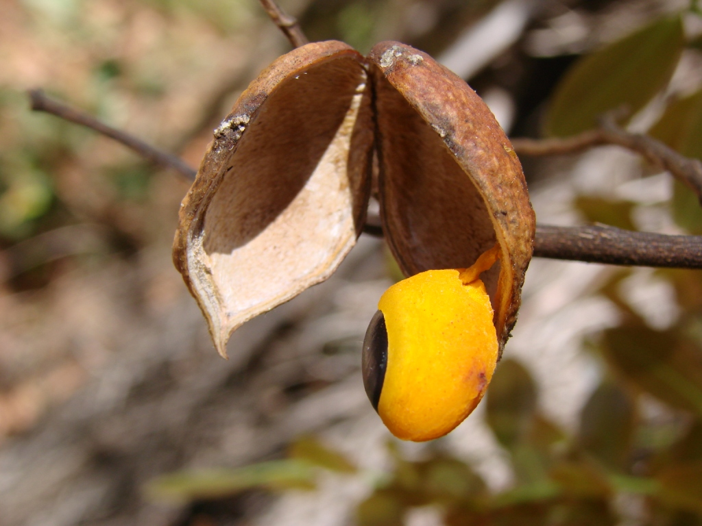 Fruit of Copaifera langsdorffii Desf. - FABACEAE - Jardim Botânico de Brasília - Distrito Federal - Brasil.